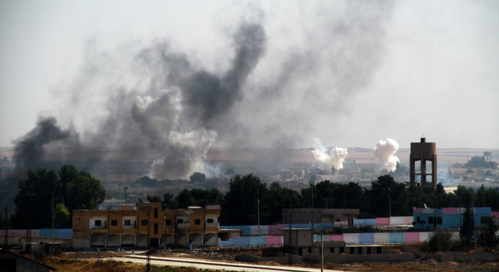 Barış Pınarı Hârekatı'nda Tel Abyad'ın bombalanması sırasında Akçakale'den çekilen görüntü.